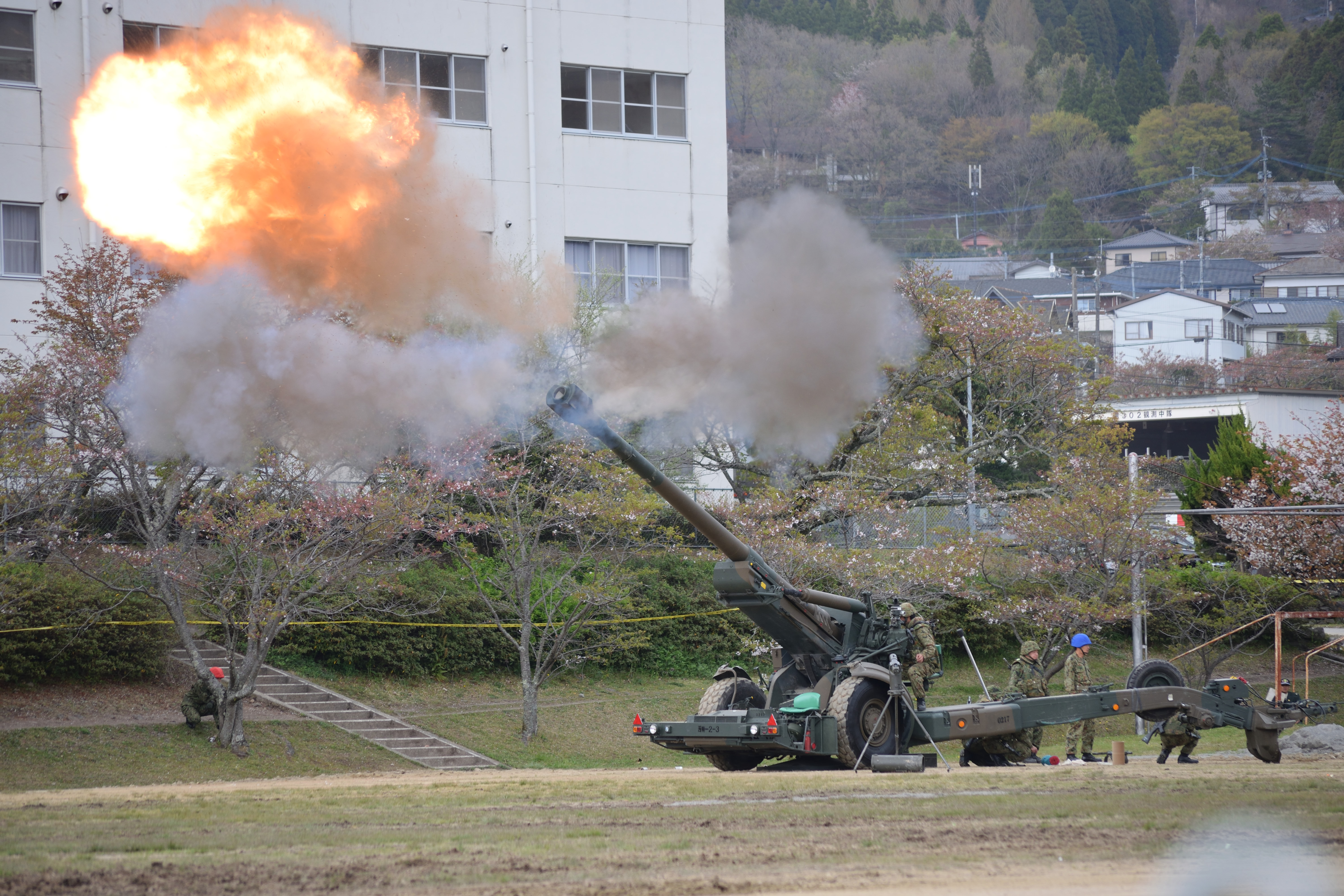 湯布院駐屯地記念式典での空包射撃 Nikon D3300